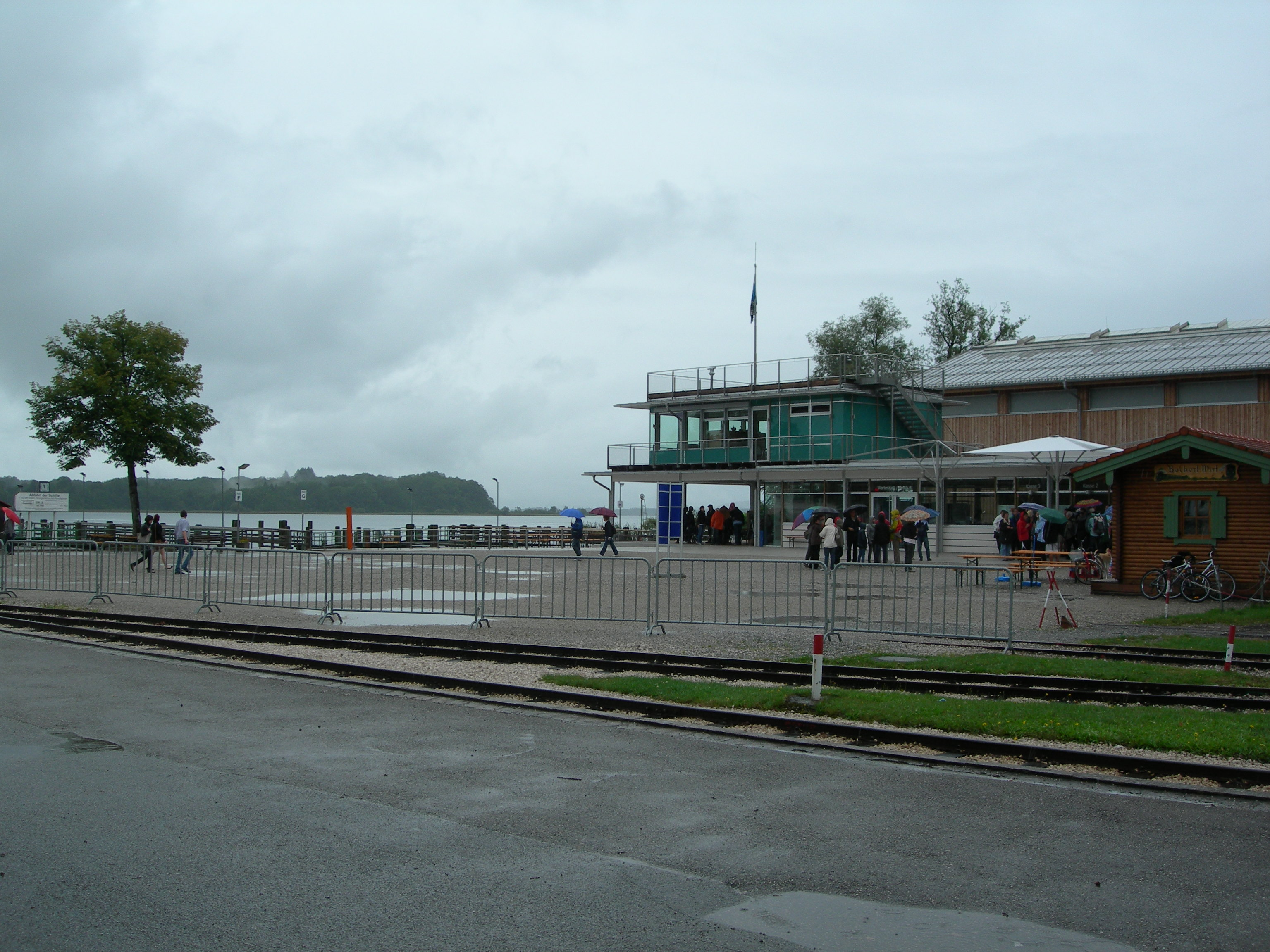 Endhaltestelle der Chiemseebahn in Prien-Stock nach dem Abriss des alten Bahnhofsgebäudes/Lokschuppens.